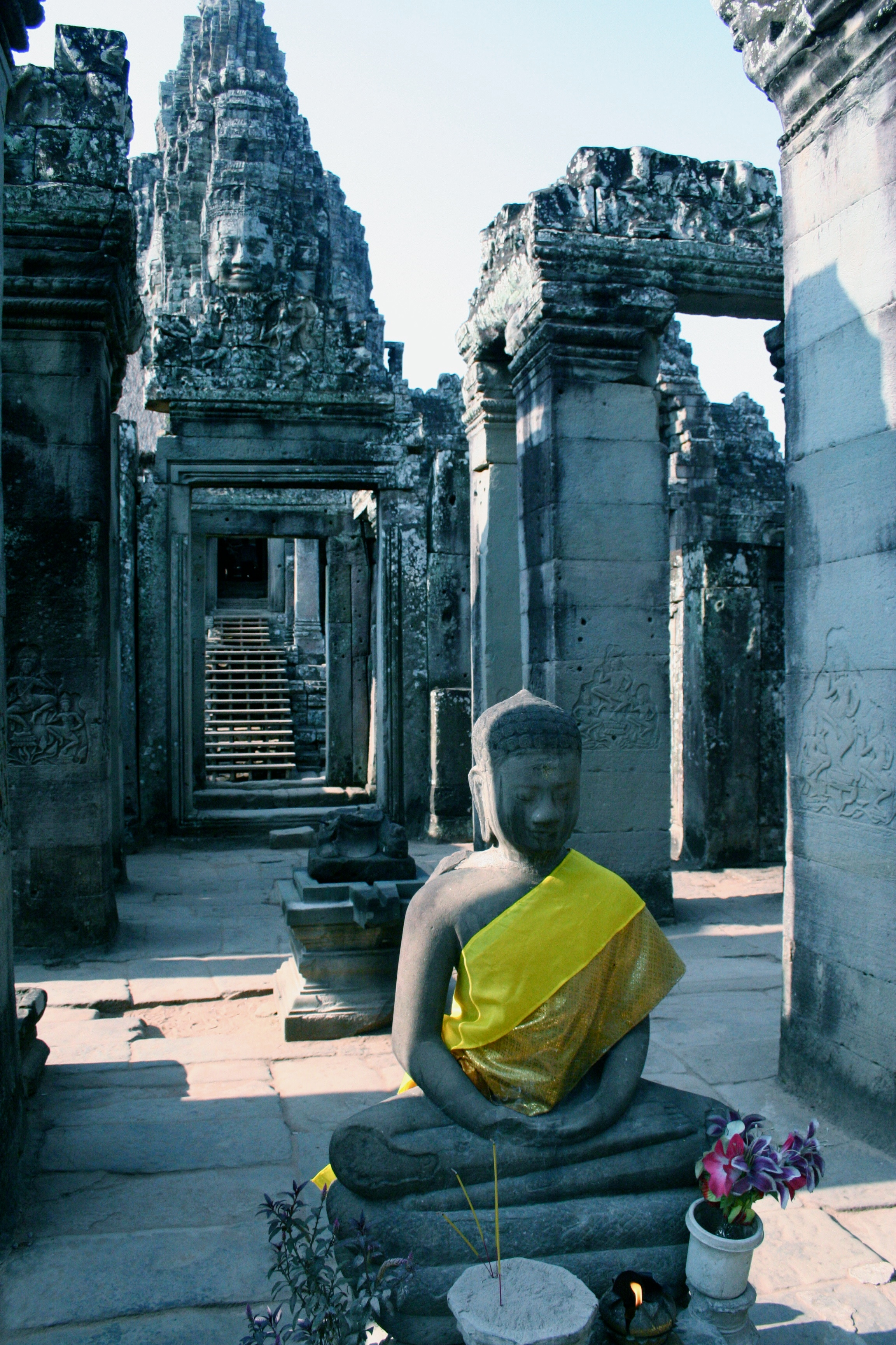 Angkor Complex, Cambodia